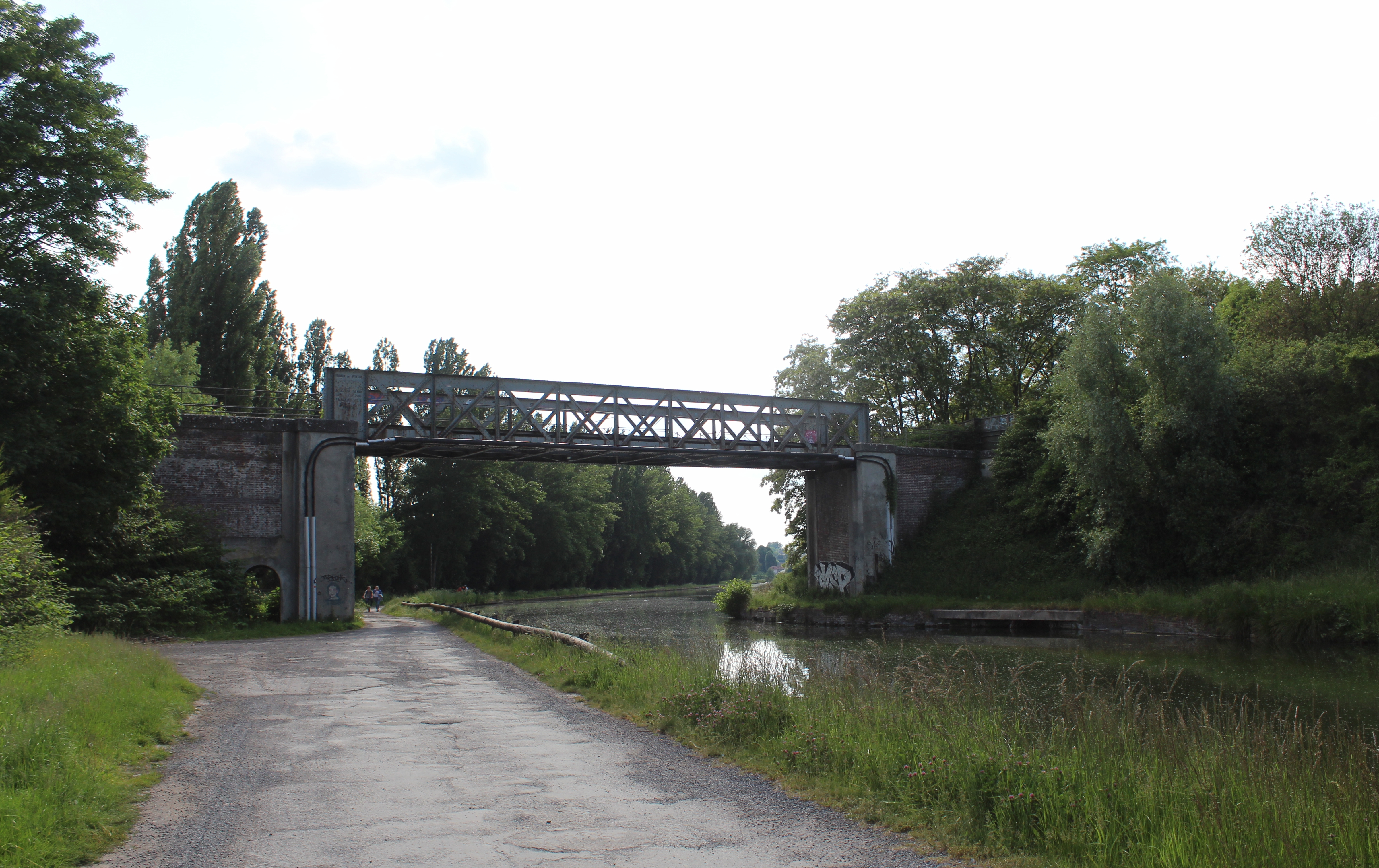 Le pont de Vélu